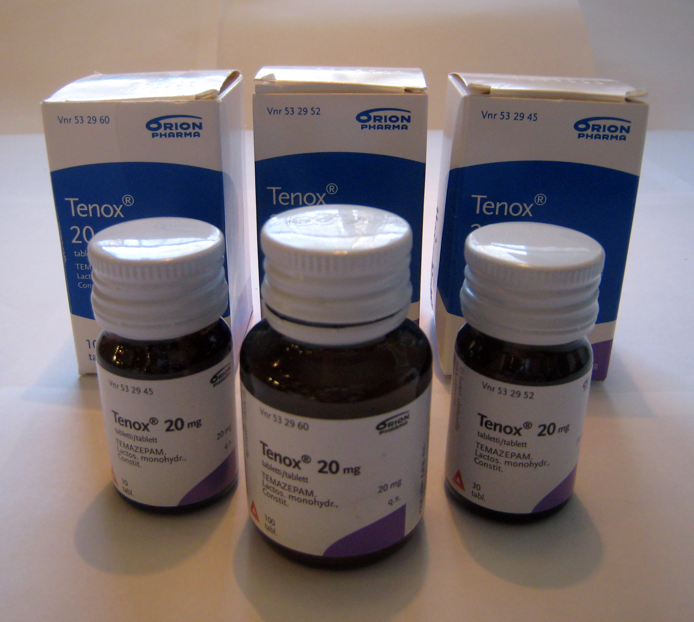 Tenox-lääkkeen myyntipakkauksia